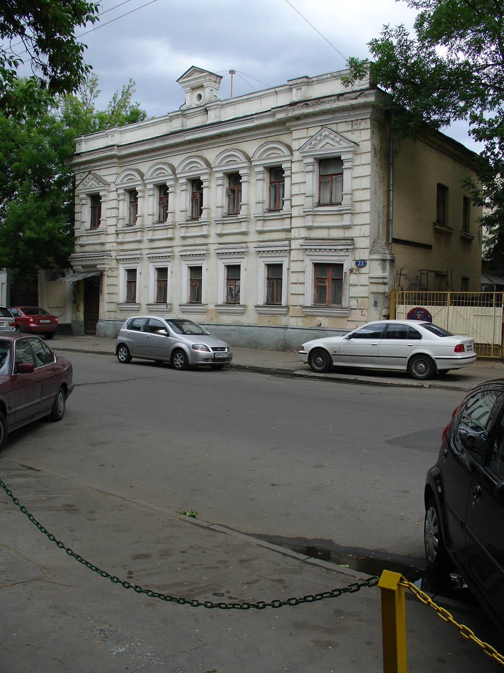 Bolshaya Tatarskaya Street, Moscow